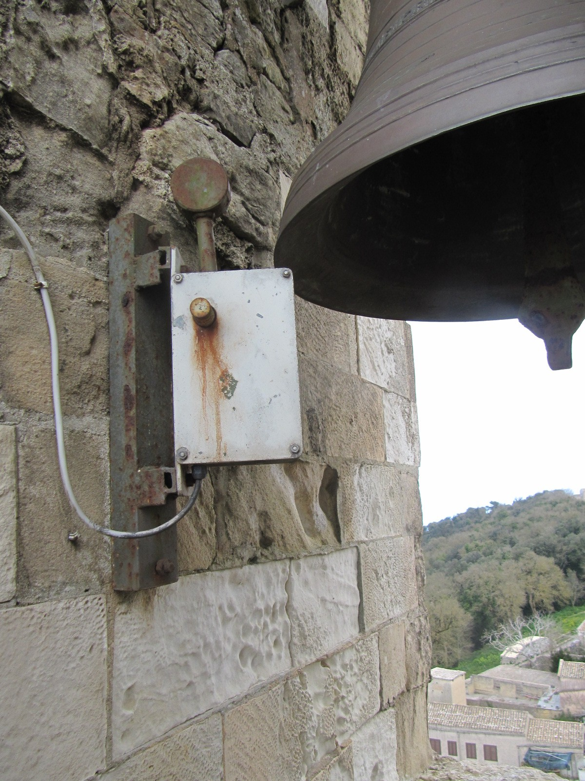 In Italien werden Glocken oft nicht freischwingend geläutet, sondern mit einem typischen elektrischen Schlagwerkmotor zum Klingen gebracht.